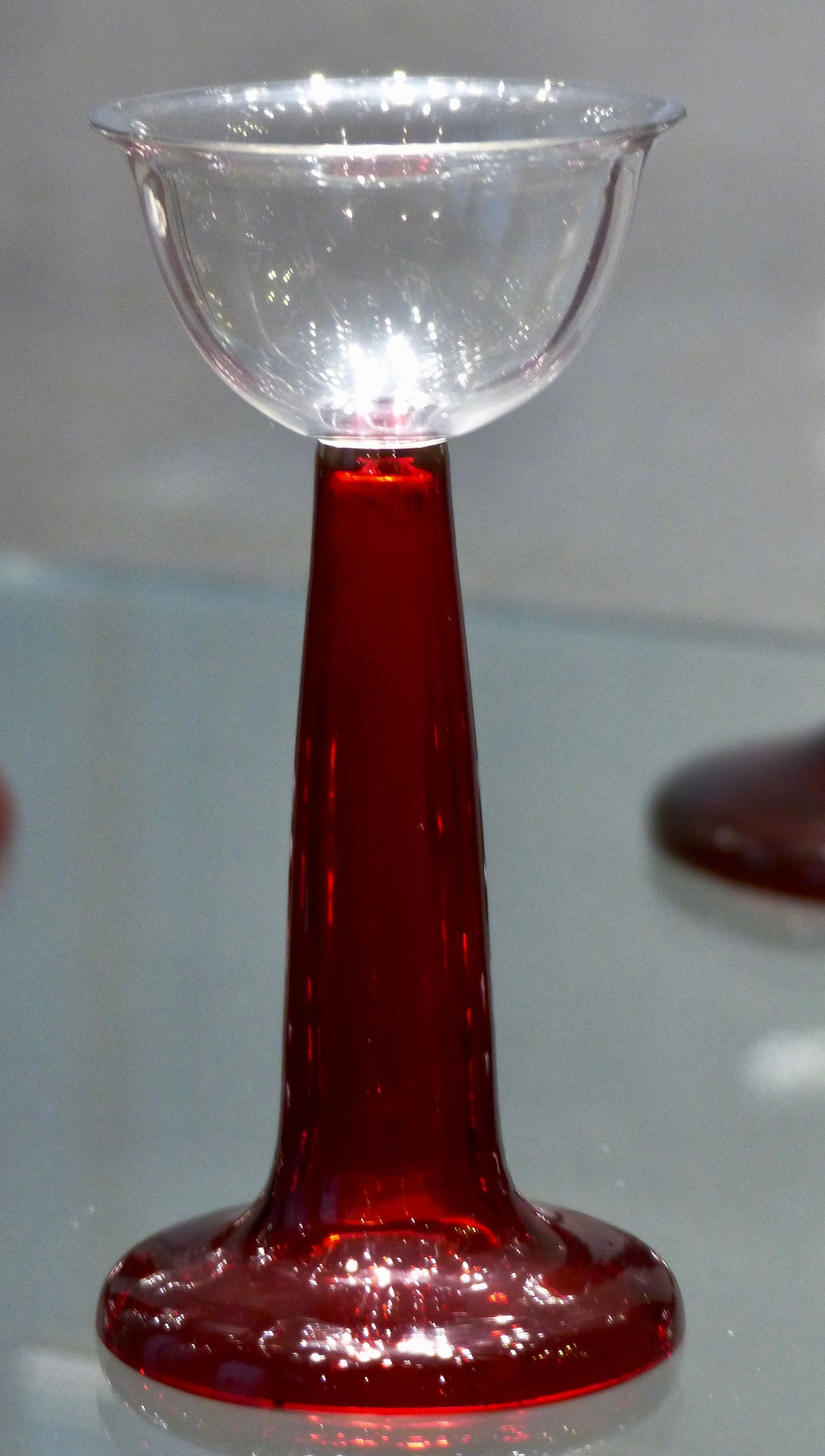 Trinkglas mit rubinrotem Fuss (Peter Behrens 1900)